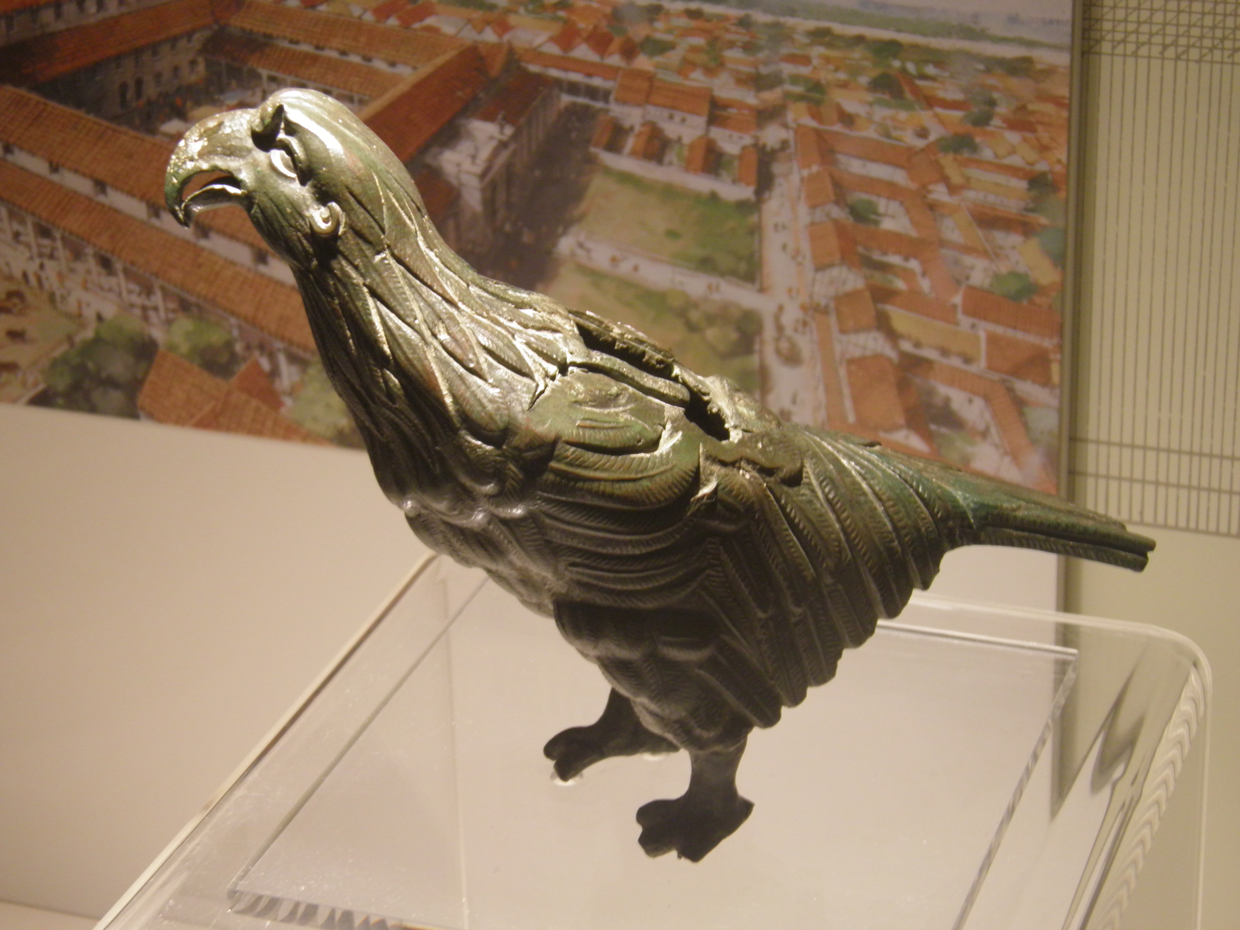 Reading Museum